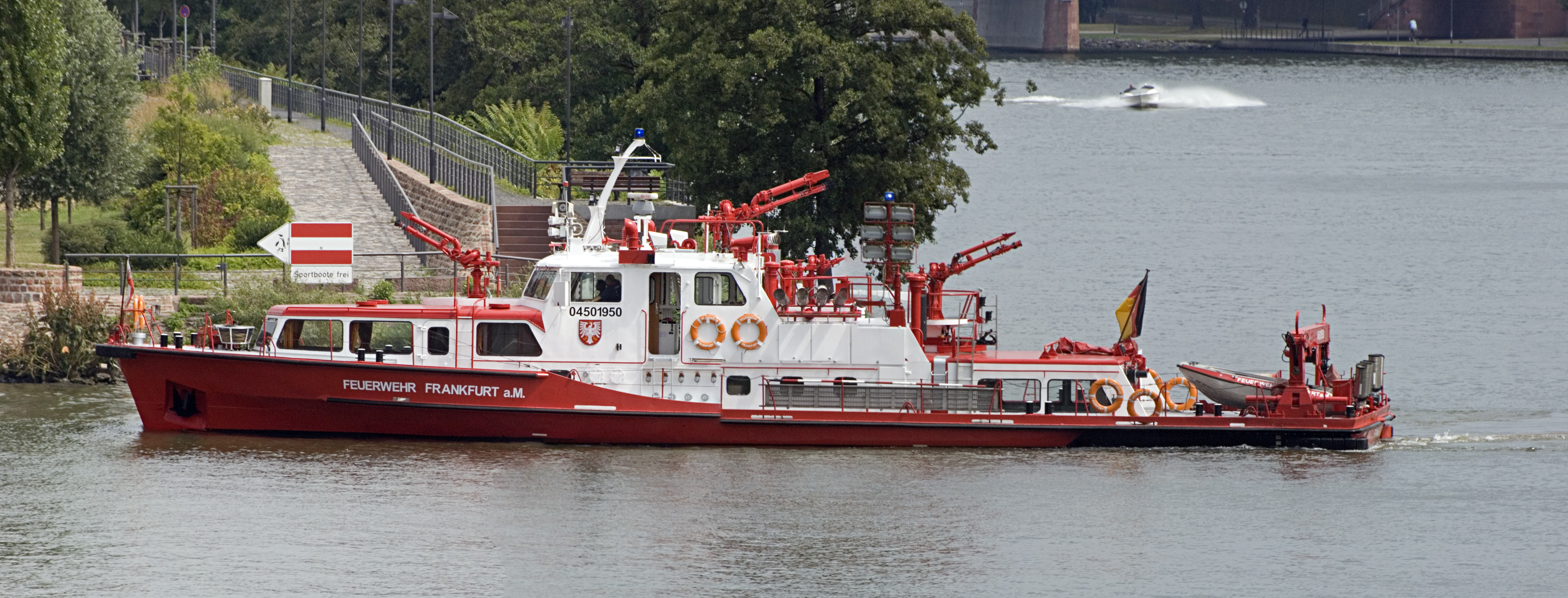 Feuerlöschboot der Berufsfeuerwehr Frankfurt am Main bei einem Einsatz am 1. August 2009 im Frankfurter Westhafen